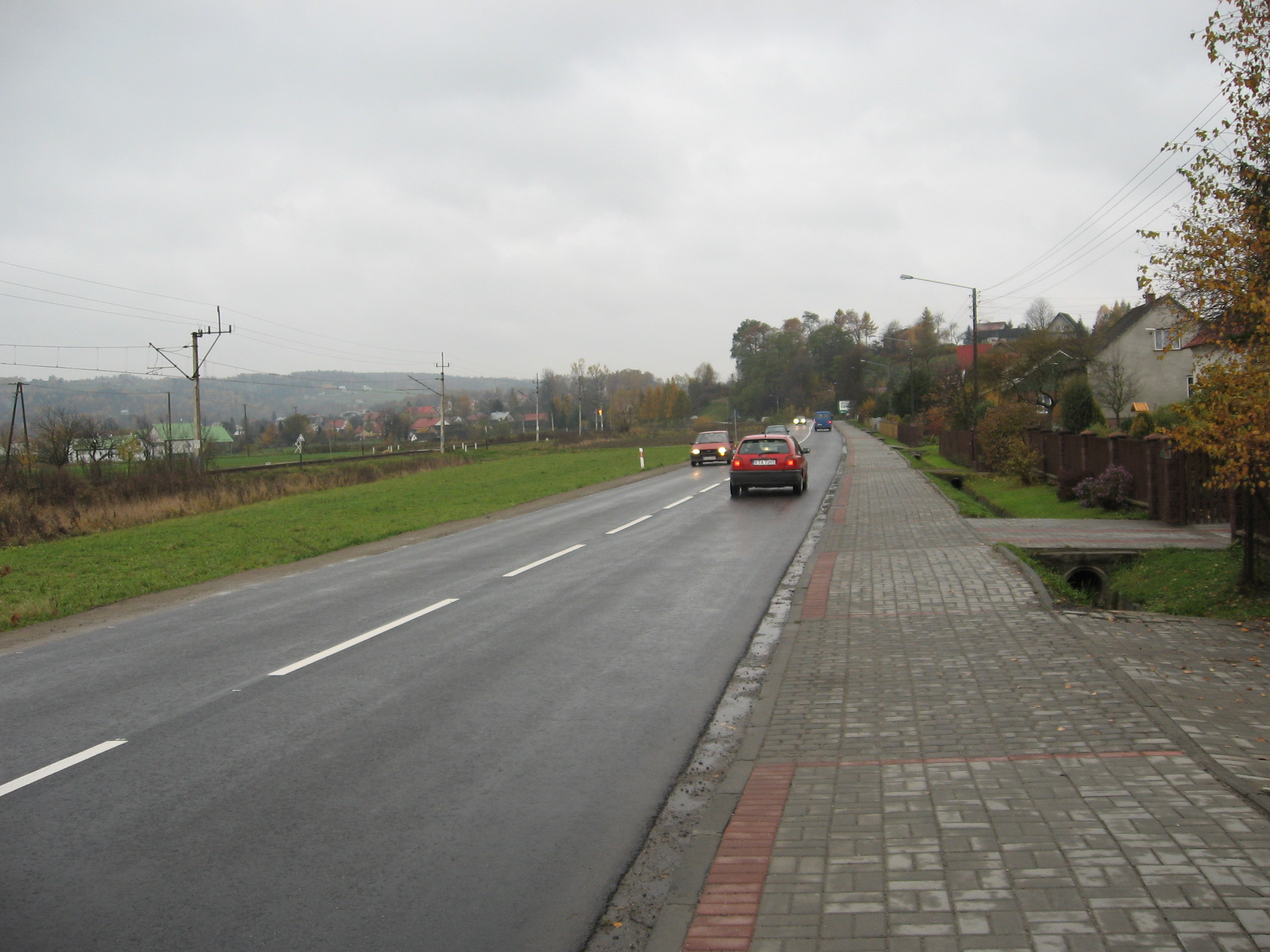 Droga wojewódzka nr 977 (Gromnik)